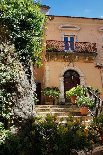 Palazzo Arcari, Picinisco